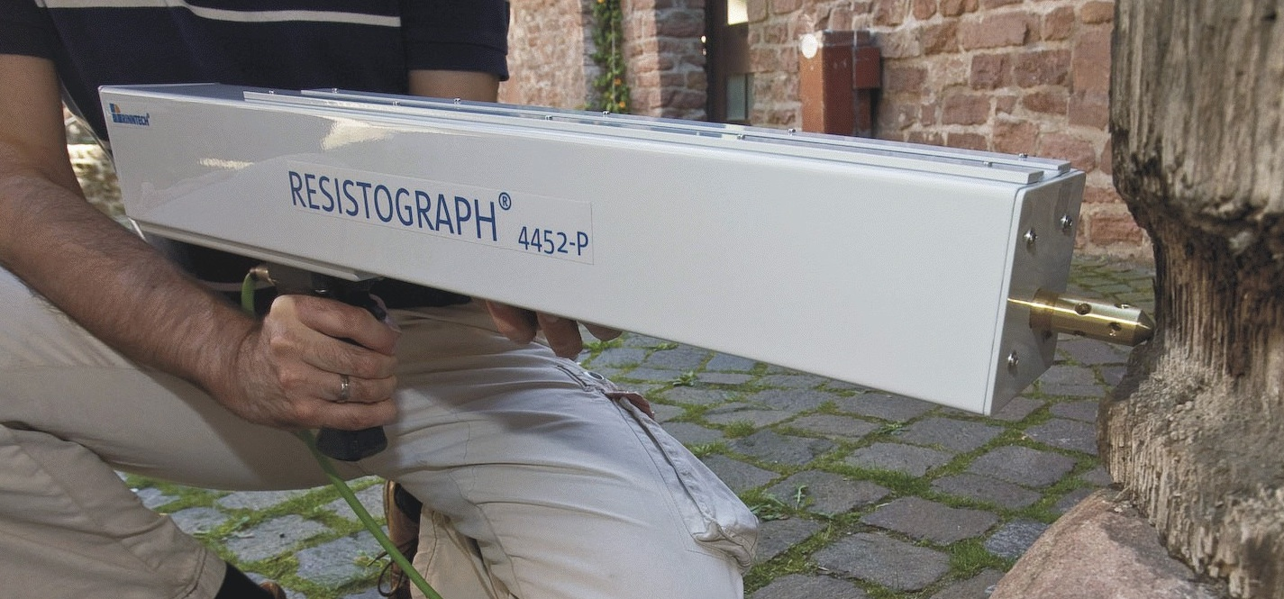 Resistograph